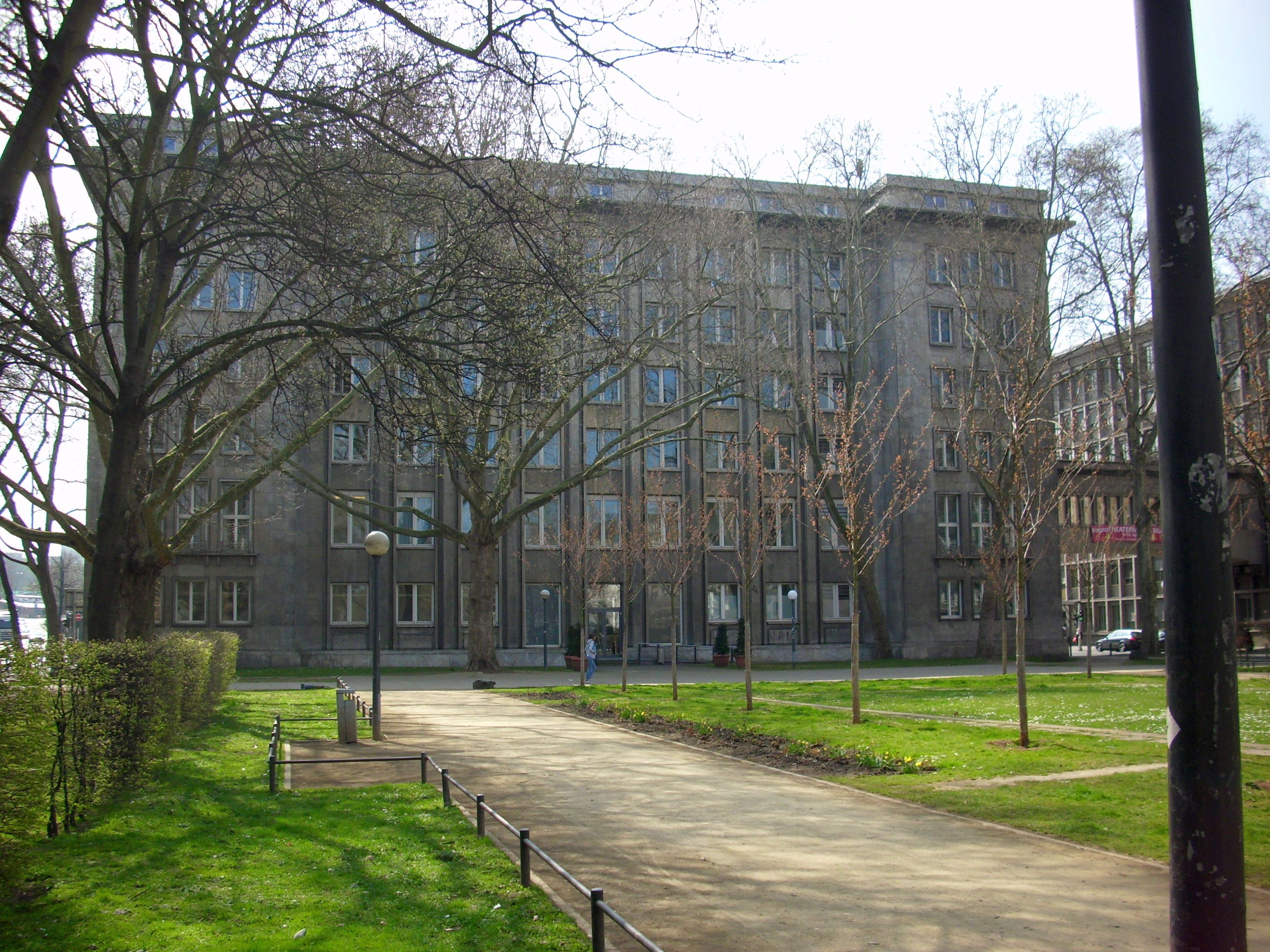 Ehemal Gebäude der Reichsbahndirektion; dreiteiliger Flachdachbau, muschelkalkverkleideter Eisenbetonskelettbau mit blockhaften Seitenflügeln, 1936/37, im ersten Geschoss gedeckte Brücke zum ehemaligen Verwaltungsbau